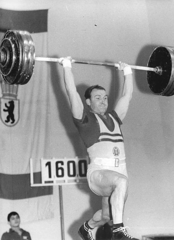 Rolf Sennewald Zentralbild Wendorf 11.11.1965 Deutsche Meister im Gewichtheben 1965 Rolf Sennewald (ASK Vorwärts Leipzig) wurde mit der Dreikampfleistung von 415,0 kg (130-125-160) Titelträger im Leichtschwergewicht. Rolf bei seinem Versuch im Stoßen.